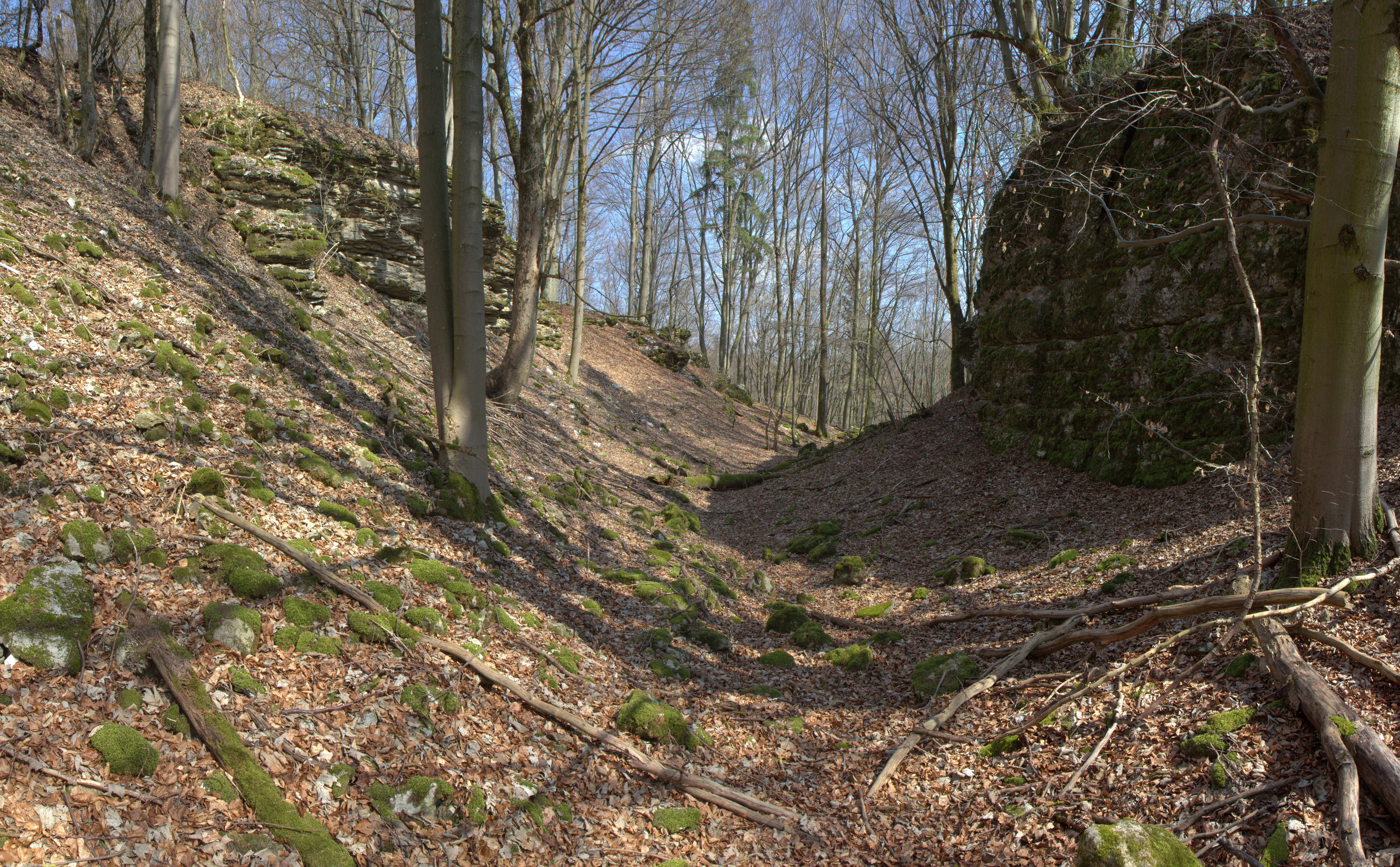 Burgstall Trossberg - Halsgraben der Burg